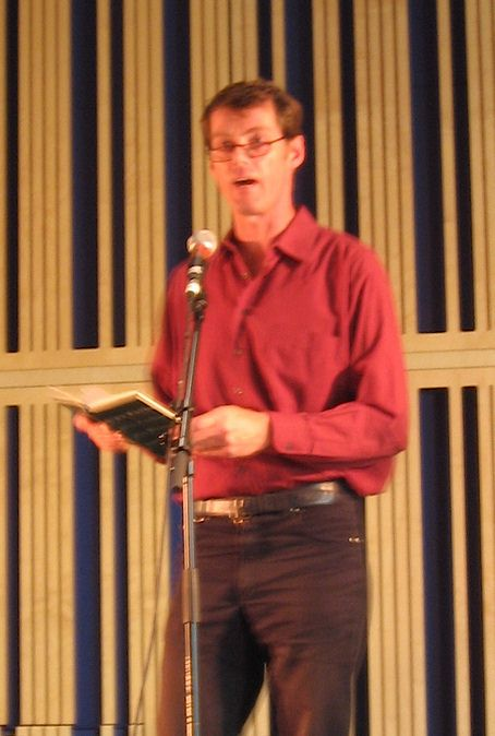 German Poet Uwe Kolbe